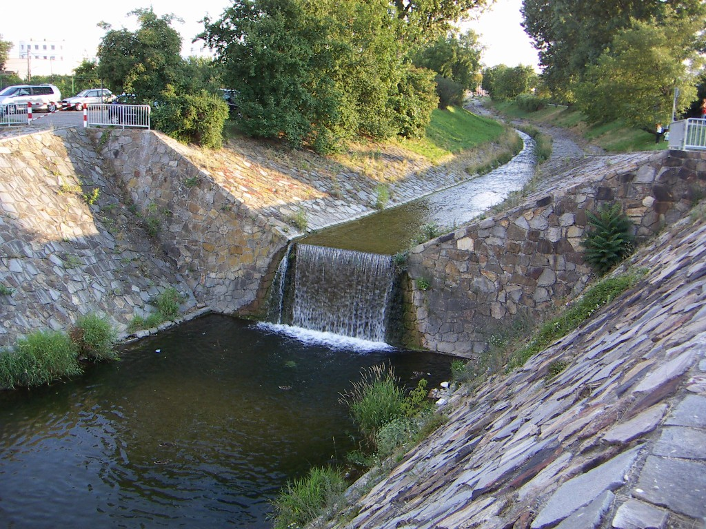 Liesing stark reguliert 002 (Bereich Atzgersdorf)